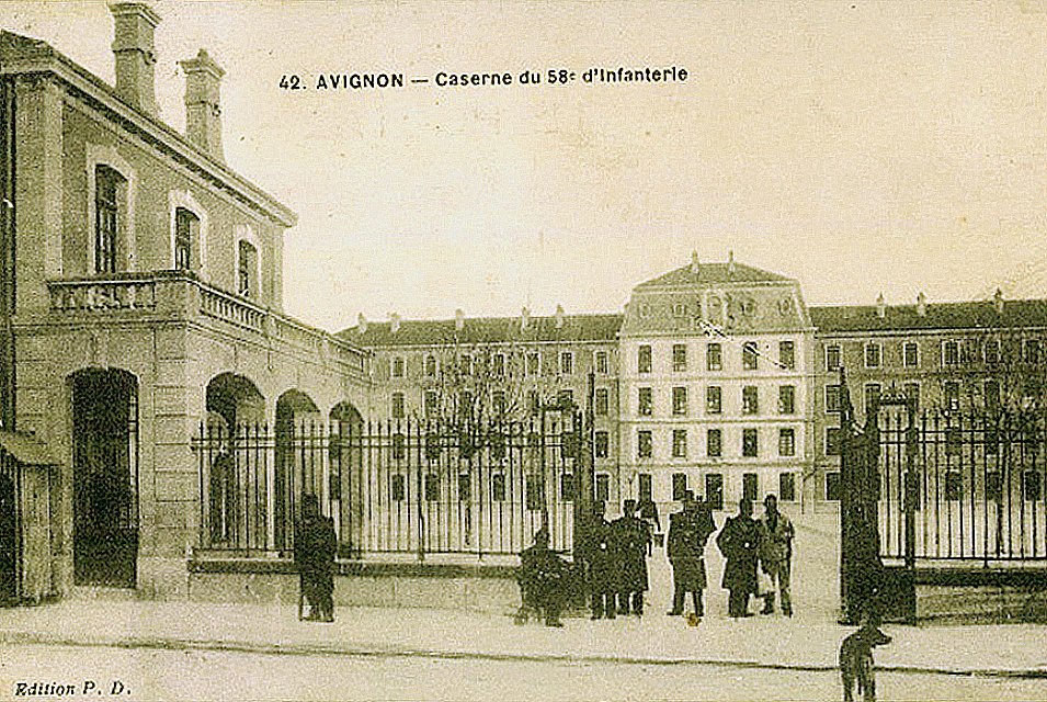 Caserne du 58e d'Infanterie, actuellement Cité administrative d'Avignon